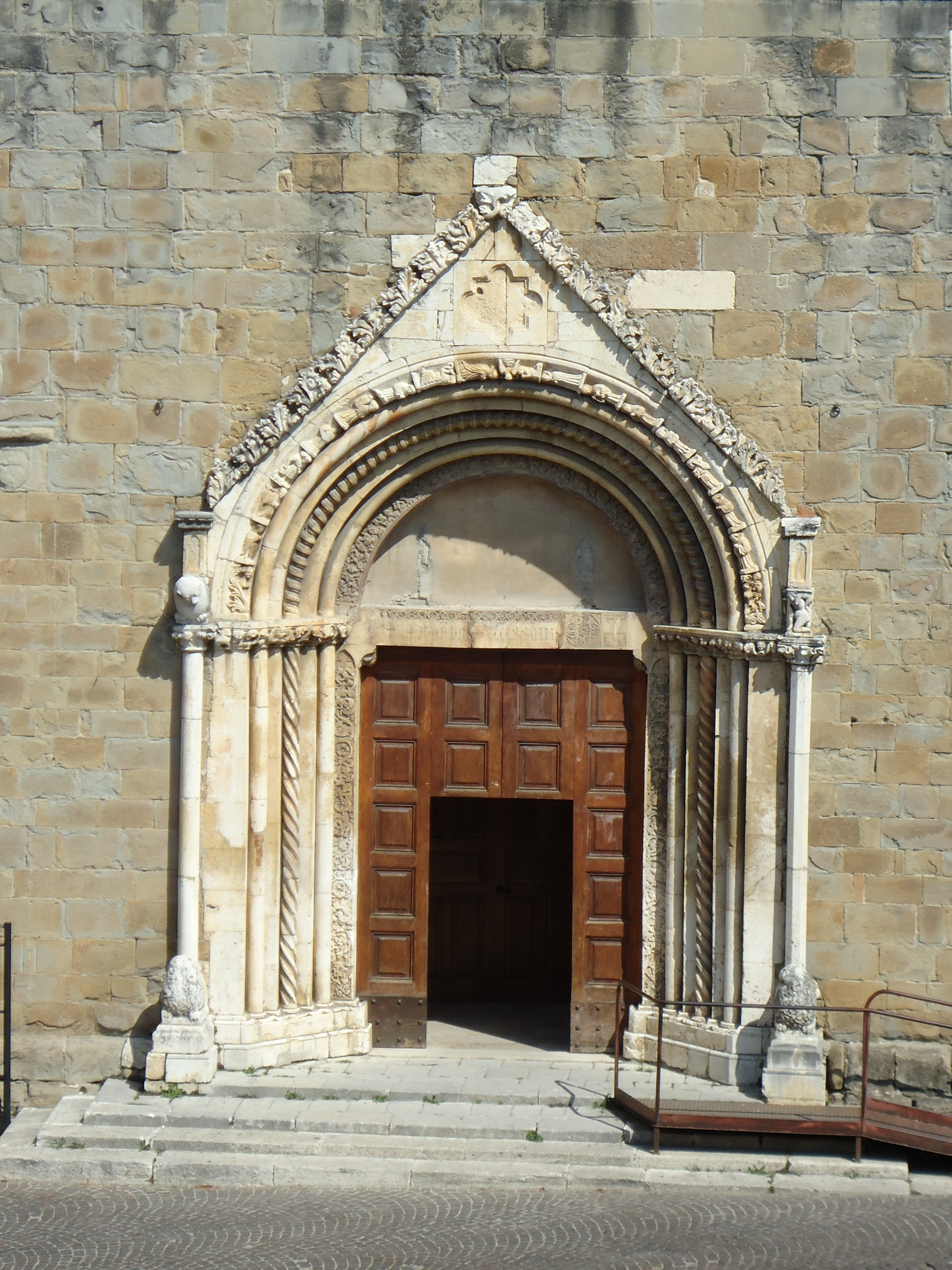 Portale della chiesa di S.Agostino (Amatrice)